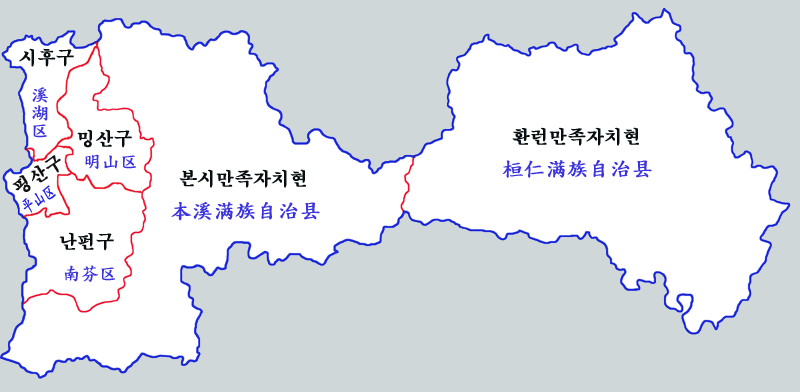 번시시 현급행정구역